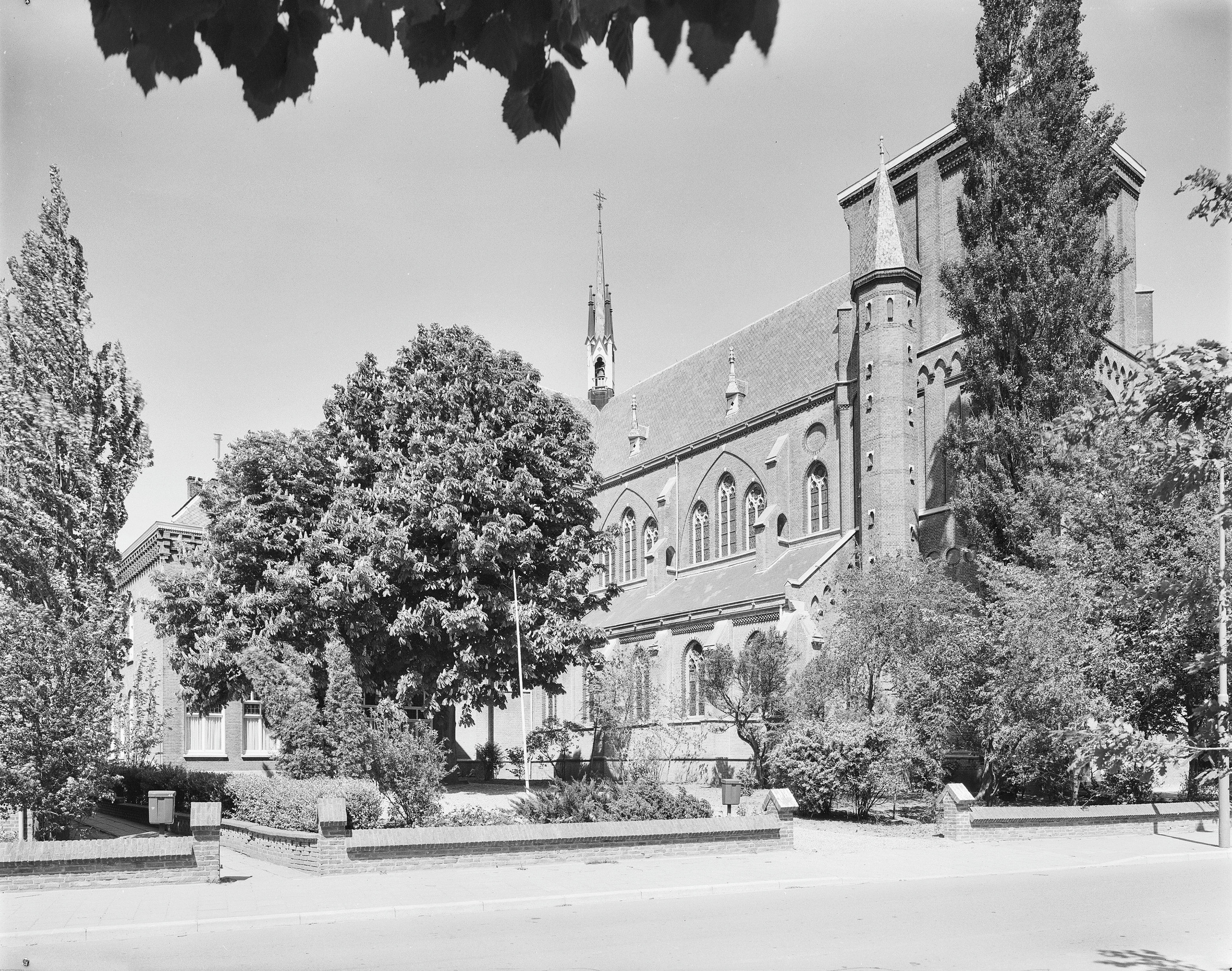 Sint Victor en Gezellenkerk: noordgevel